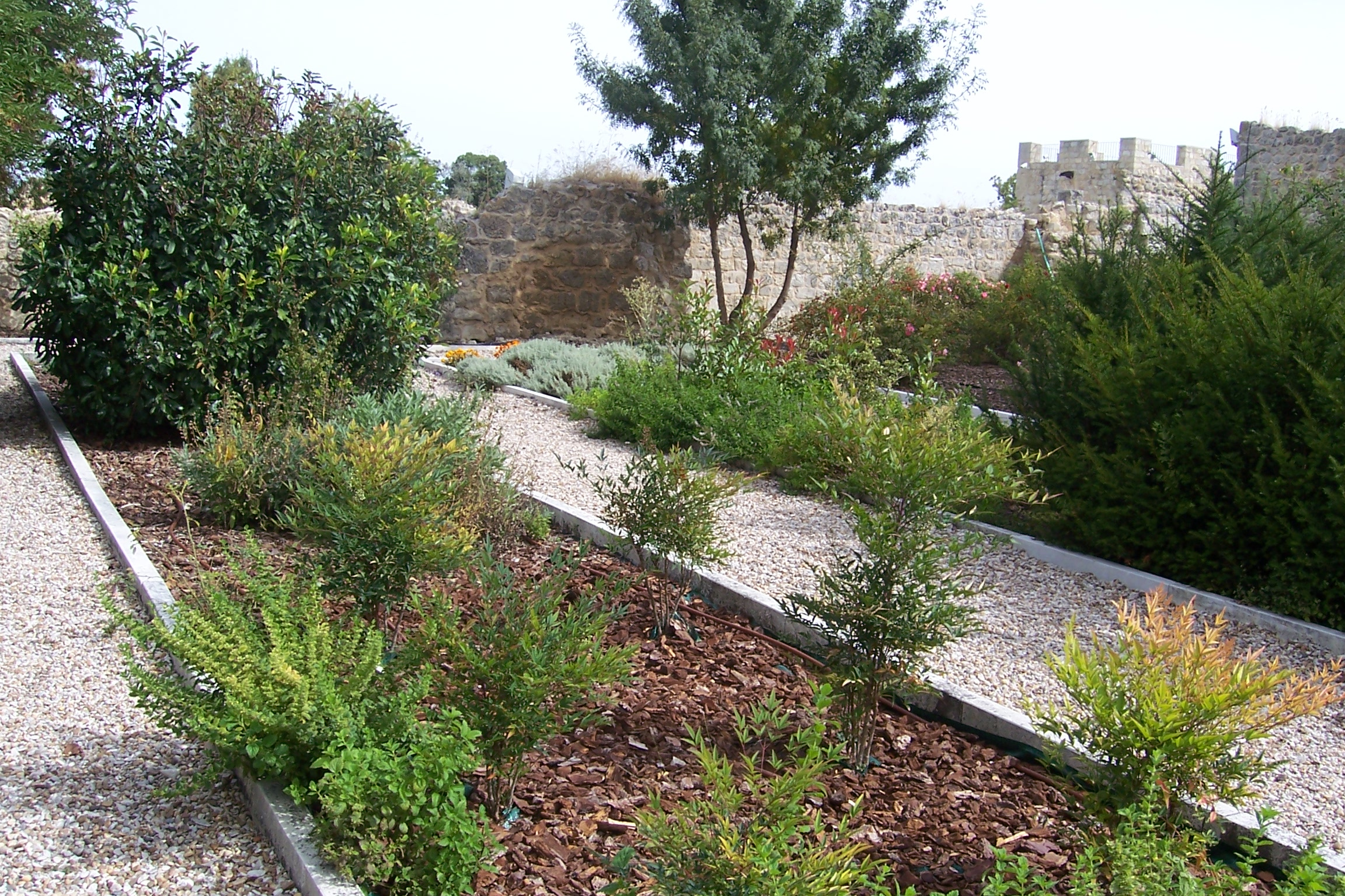 Jardín de plantas aromáticas en el monasterio de Santa María de Matallana. Sólo quedan ruinas del monasterio pero se ha reestablecido el jardín que tuvieron los monjes para plantas que les sirvieran en la botica y en la cocina.